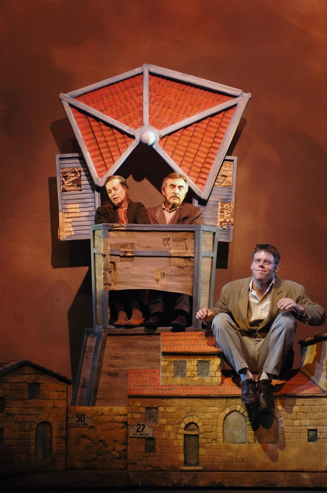 ההצגה מומיק, תיאטרון גשר